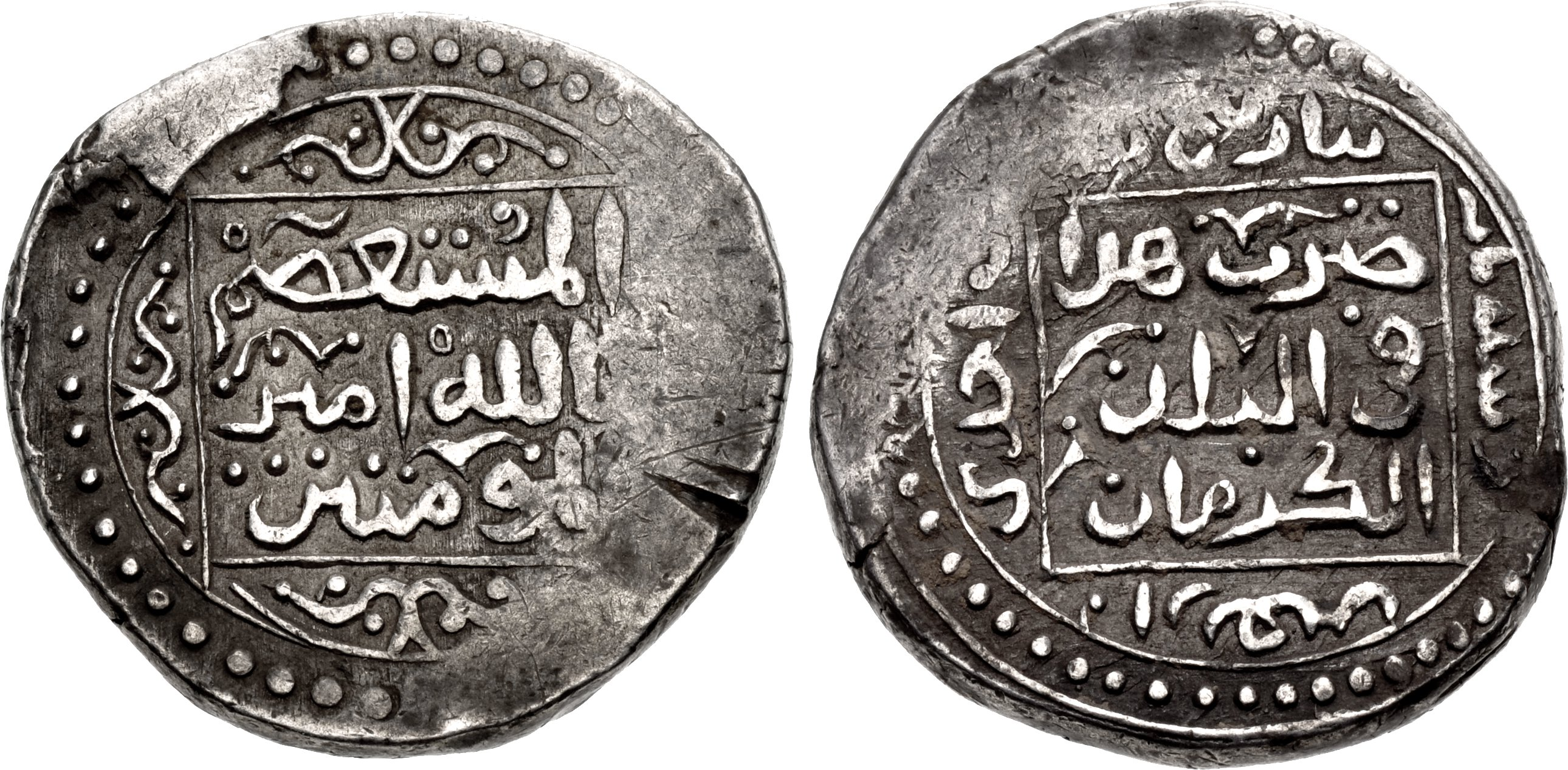 سکه ۱۰ دیناری توراگینا خاتون که به نام مستعصم بالله ضرب گردیده.